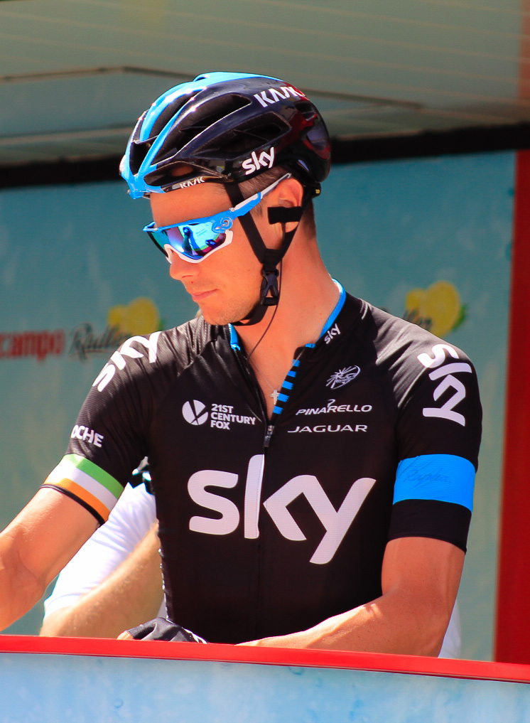 Vuelta a España 2015 | 8ª Etapa Puebla de Don Fadrique - Murcia-10